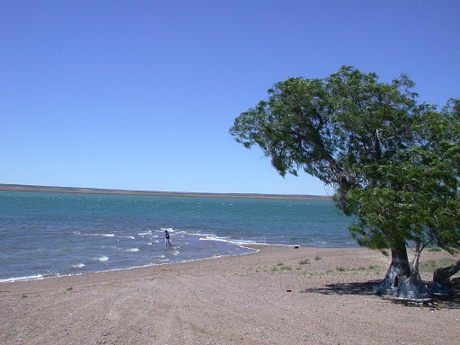 Canal La Marea SAO